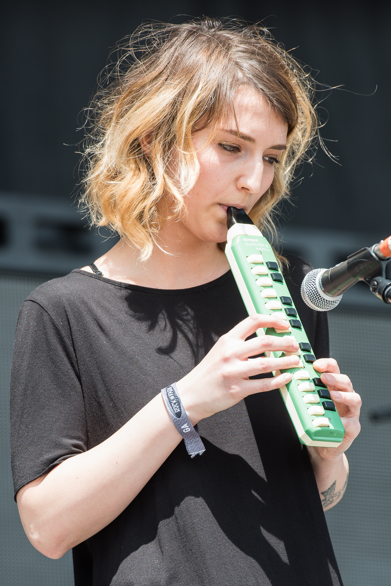 ARGO-Konzerte,Beck's Park Stage,Festival,Konzert,Leak,Livekonzert,Livemusik,Musik,RiP,Rock im Park 2016